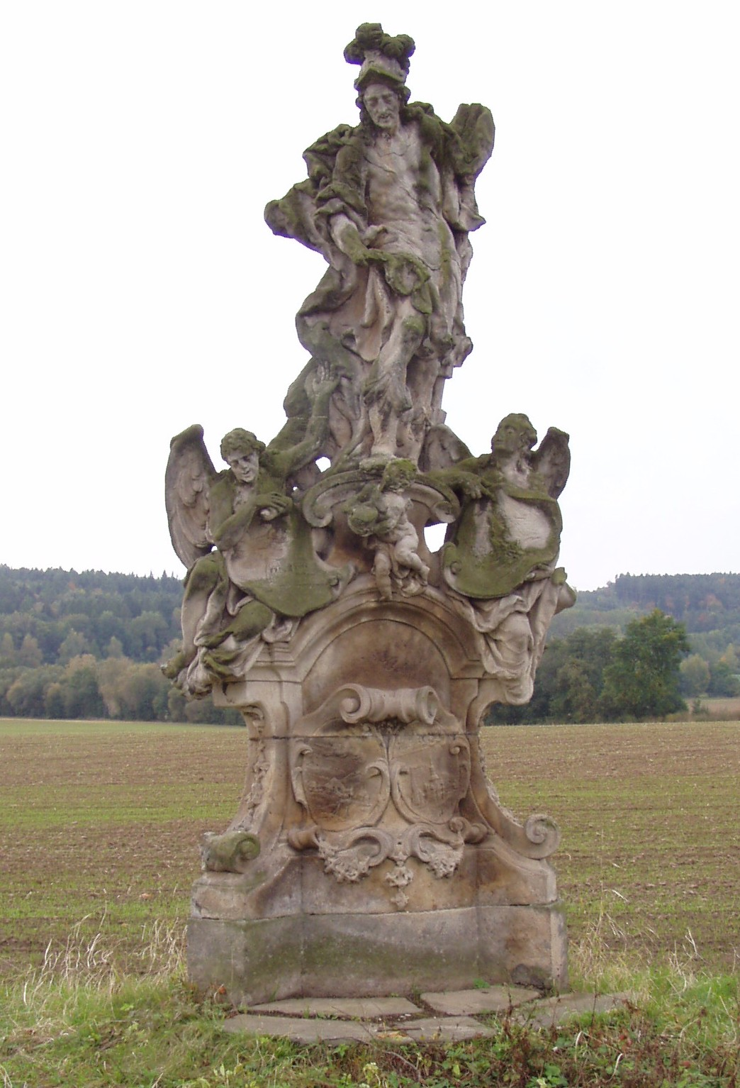 Sousoší sv. Floriána (Žireč), při cestě do Stanovic, Žireč